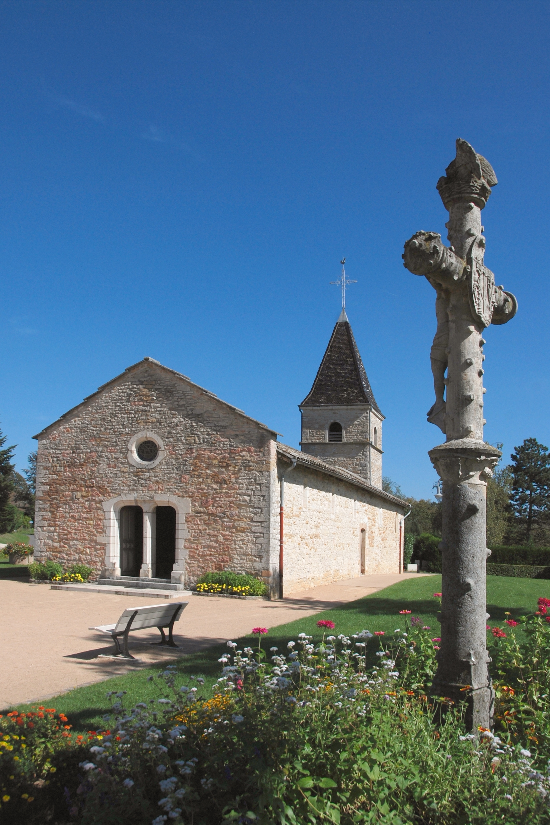 situation actuelle de la croix à proximité de la chapelle